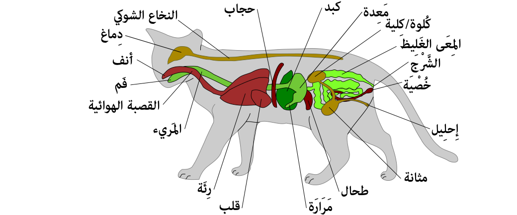 مخطط تشريح جسم القط